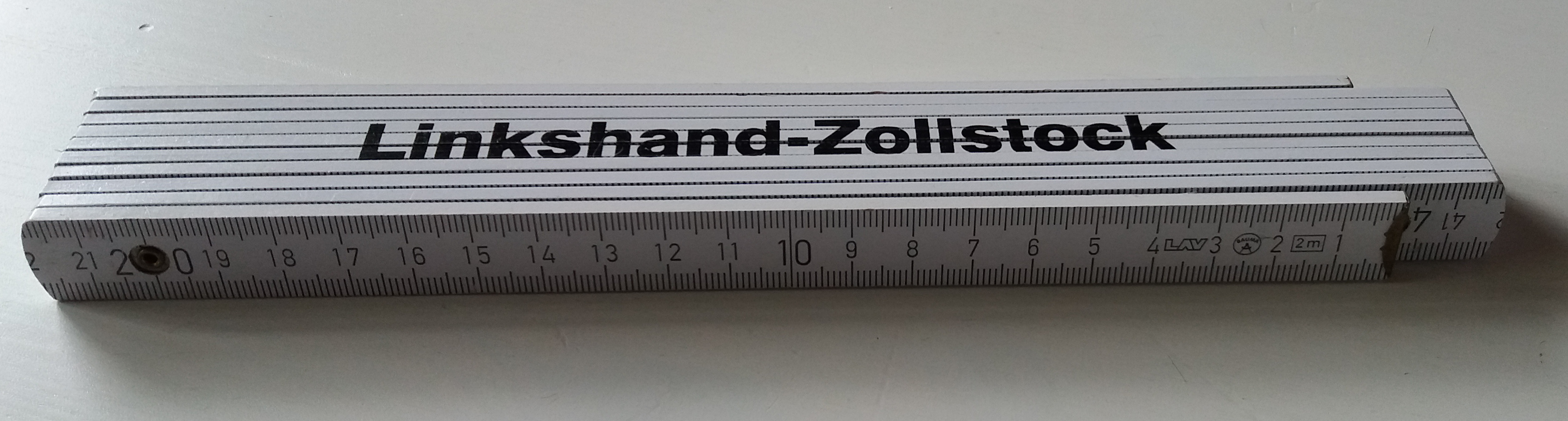 Linkshandzollstock